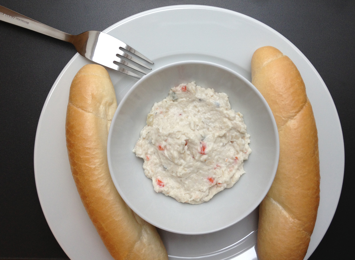 Jedinečné slovenské jedlo - Treska s majonézou. Šalát, ktorý sa dá pokladať ako národné jedlo.